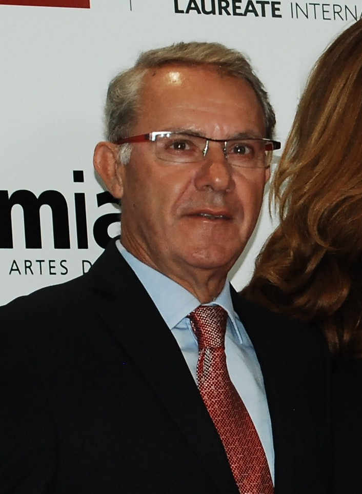 Tesoros vivos de la televisión